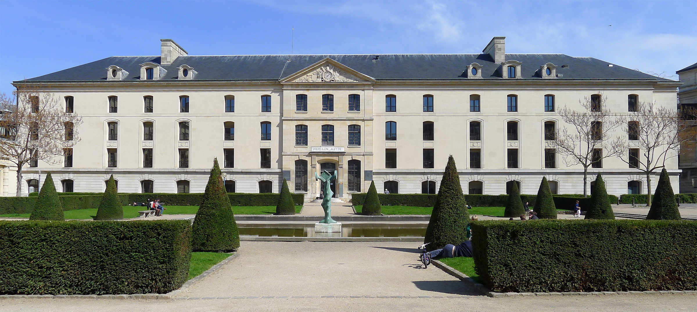 Ancienne école polytechnique (pavillon Joffre) - Jardin Carré - Paris V .